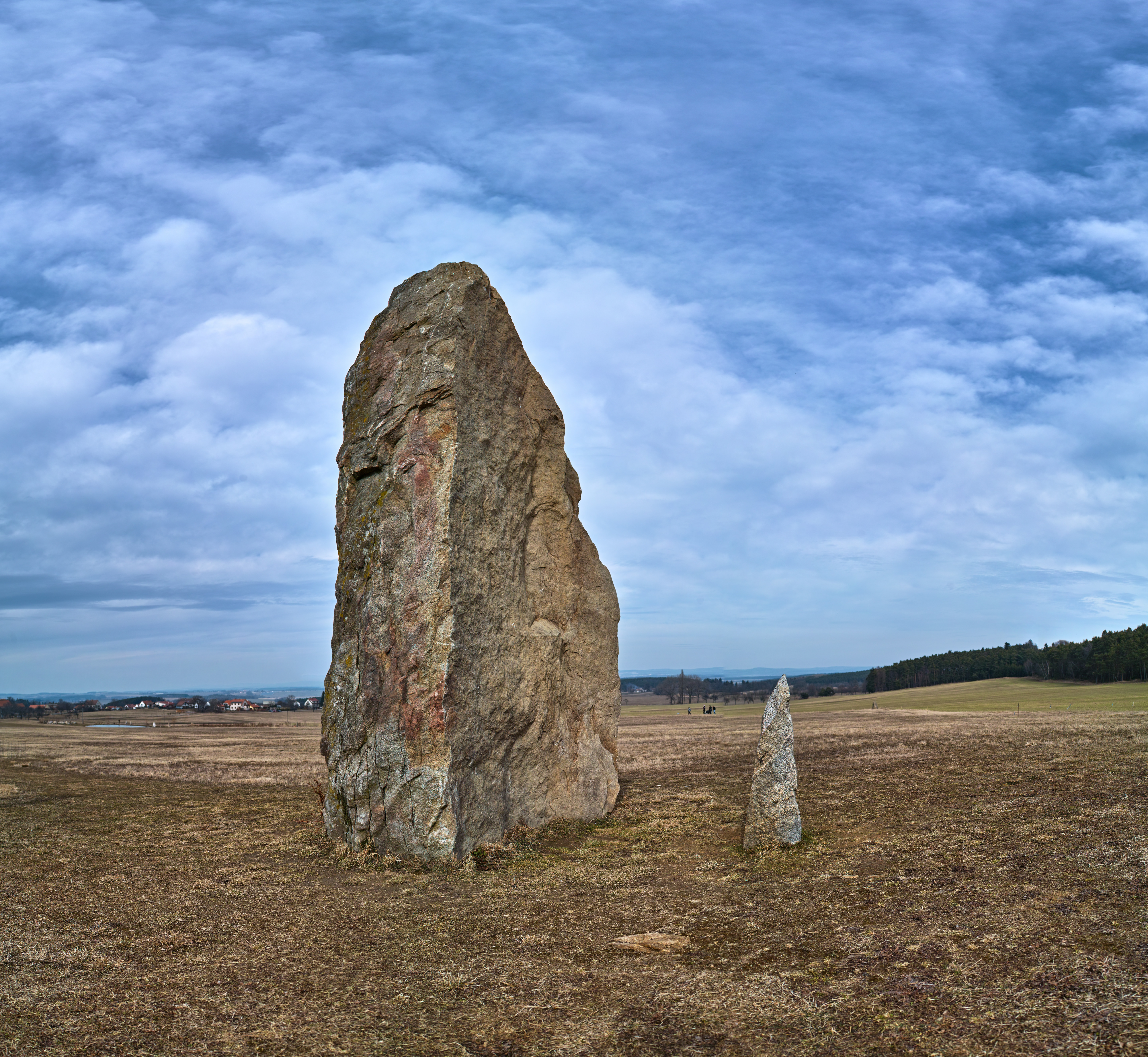 Soliterní menhir poblíž Holašovického kromlechu